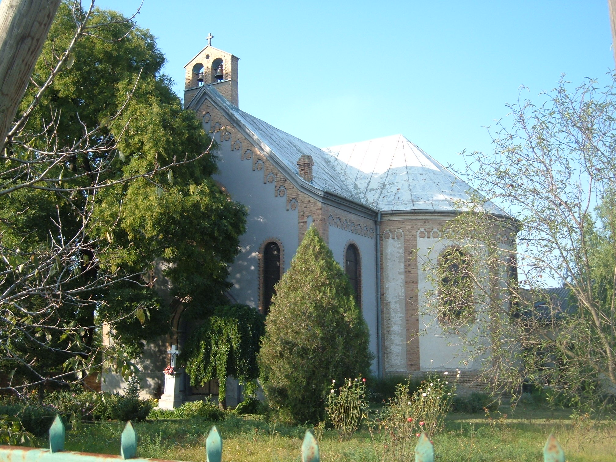 Katolička crkva u Loku